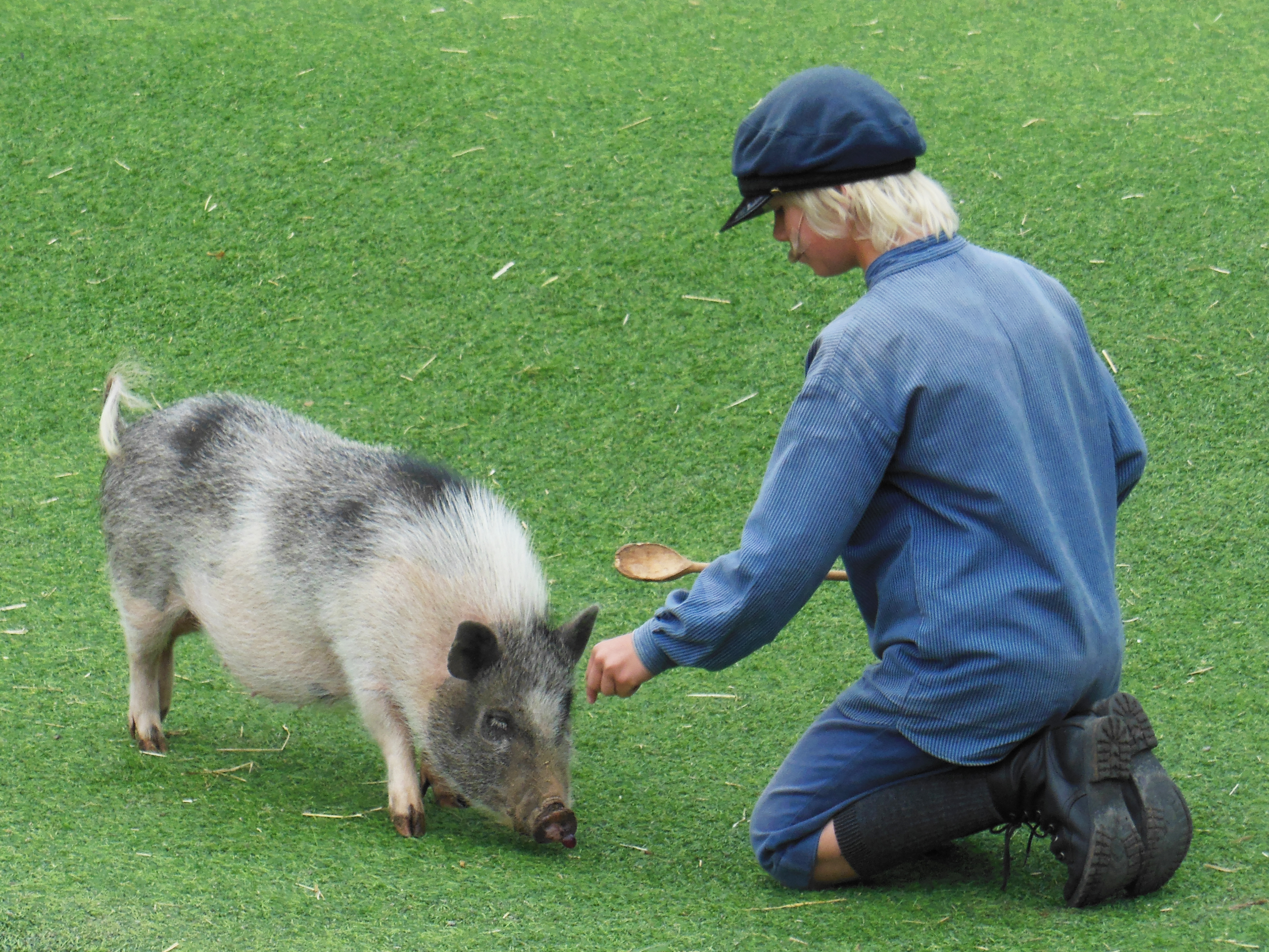 Emil i Lönneberga och griseknoen på Astrid Lindgrens Värld i Vimmerby, 2014.